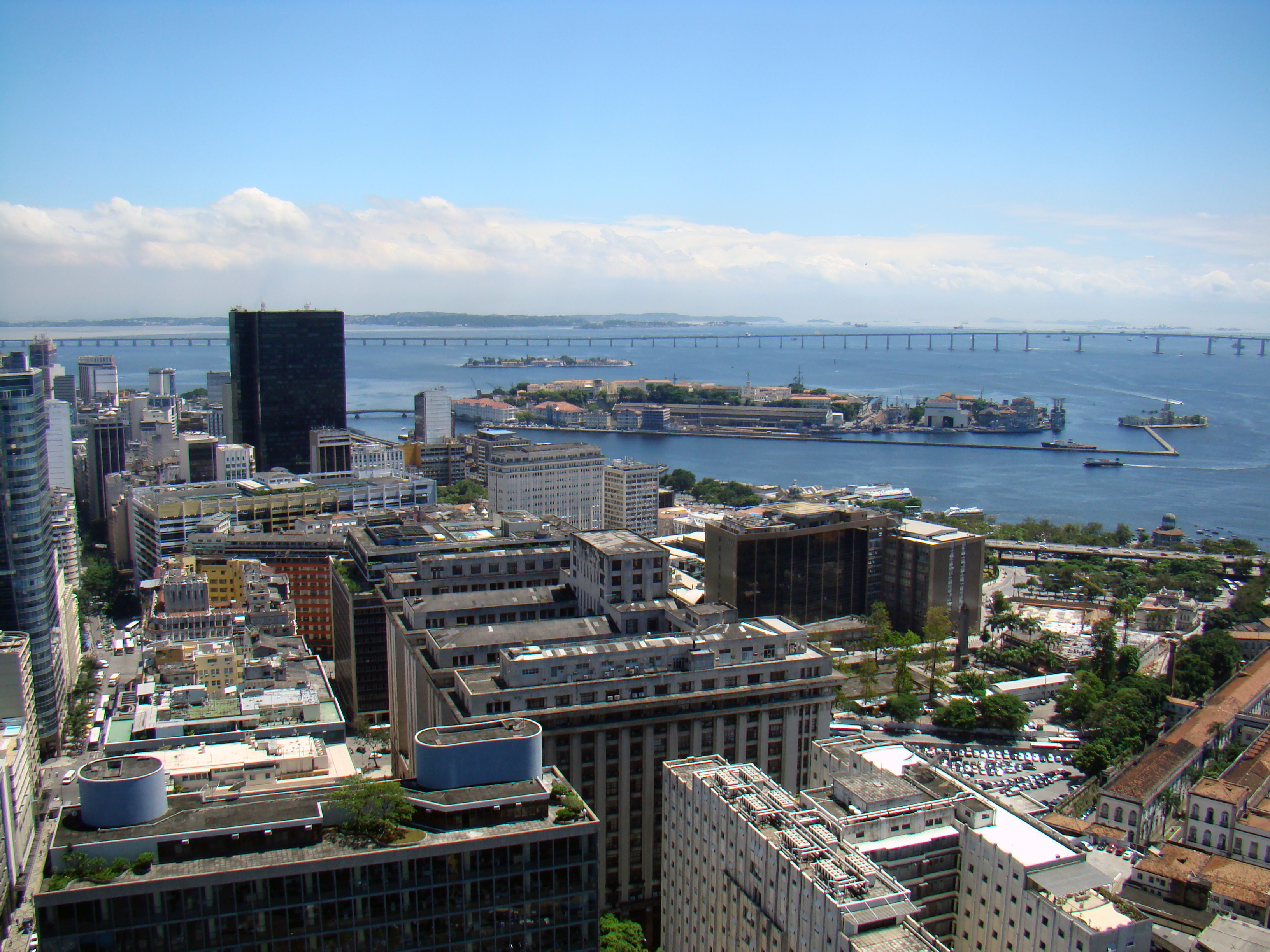 O Centro é um bairro da Região Central da cidade do Rio de Janeiro